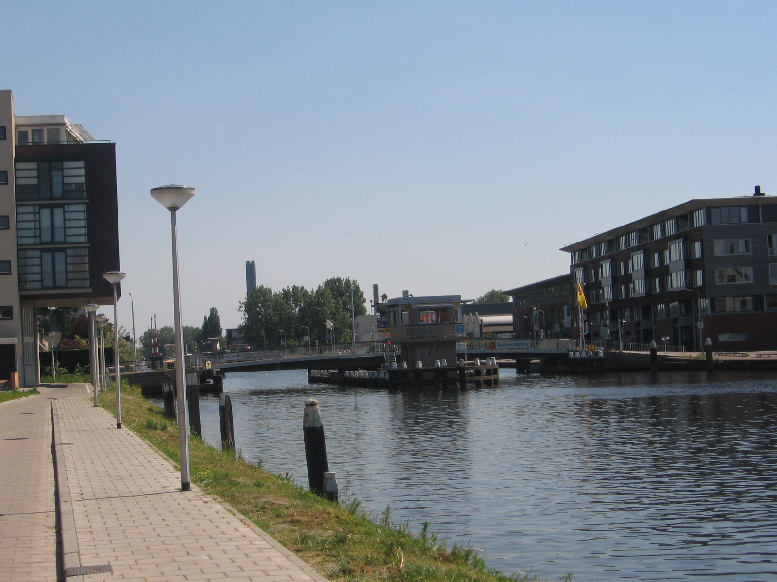 Bridges in Delft, 11 juni